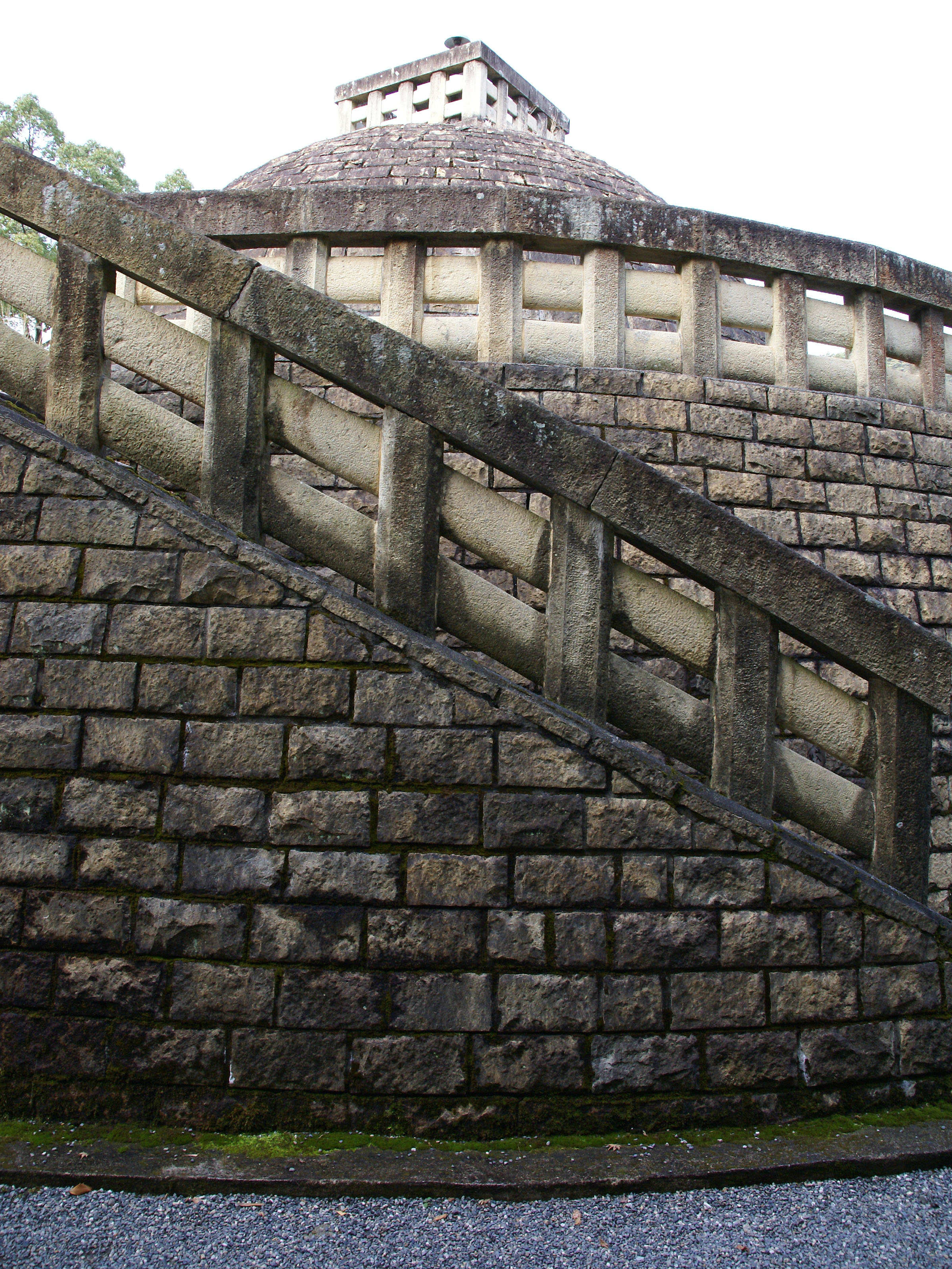 Adashino-nenbutsuji in Sagano, Kyoto, Japan